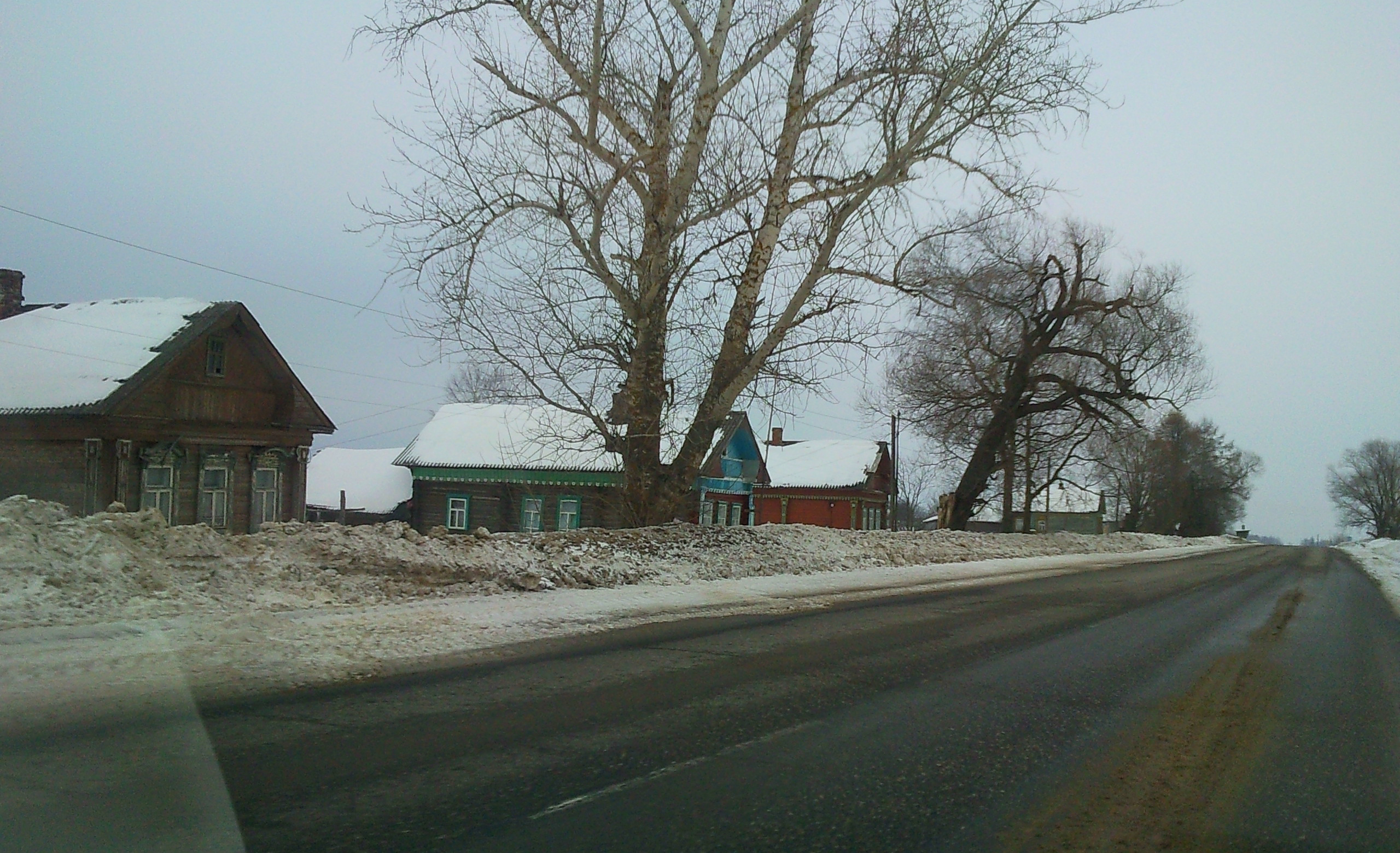 Село Кондюково Комсомольского района Ивановской области